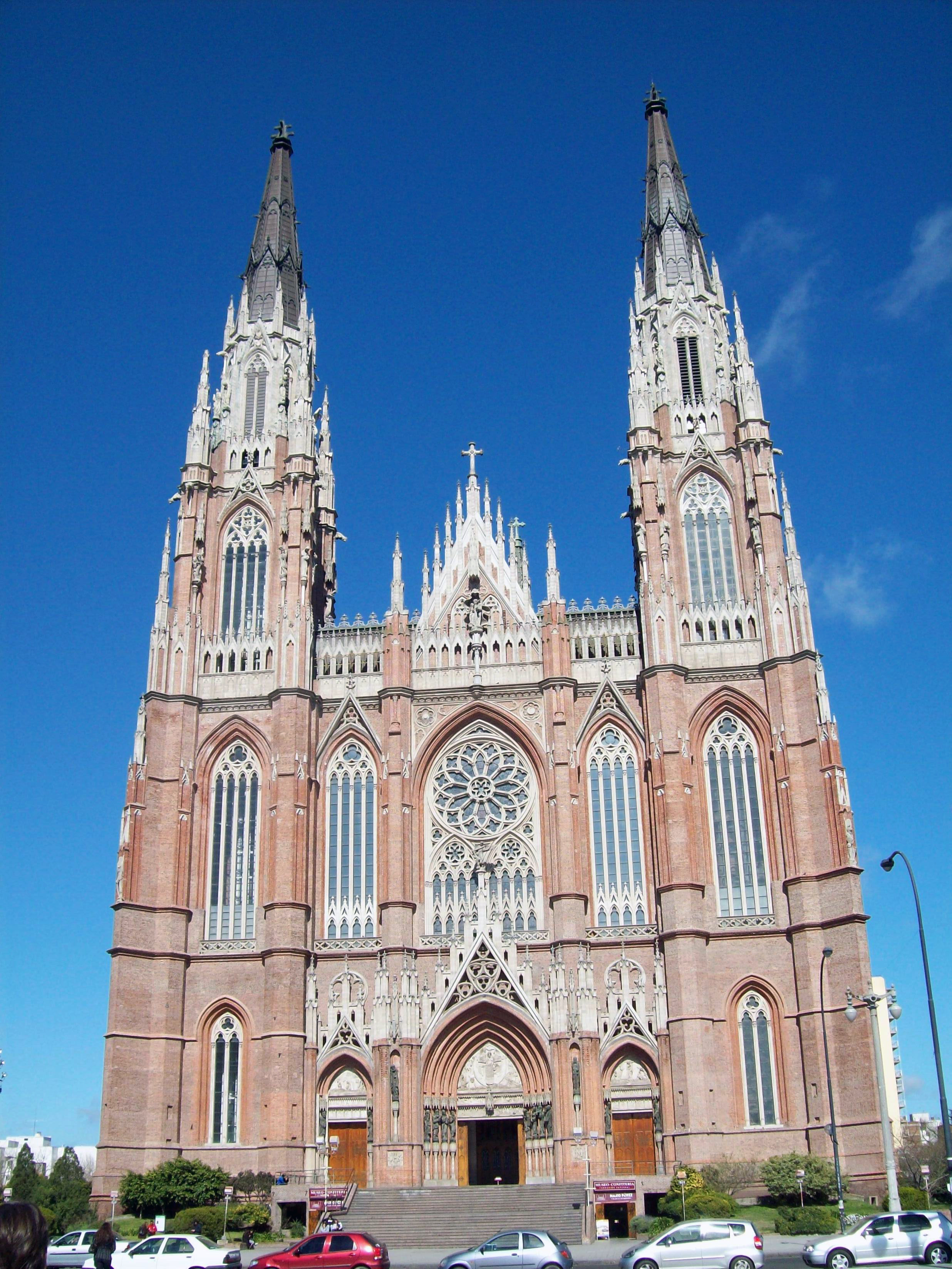 Plano general de la catedral de La Plata.